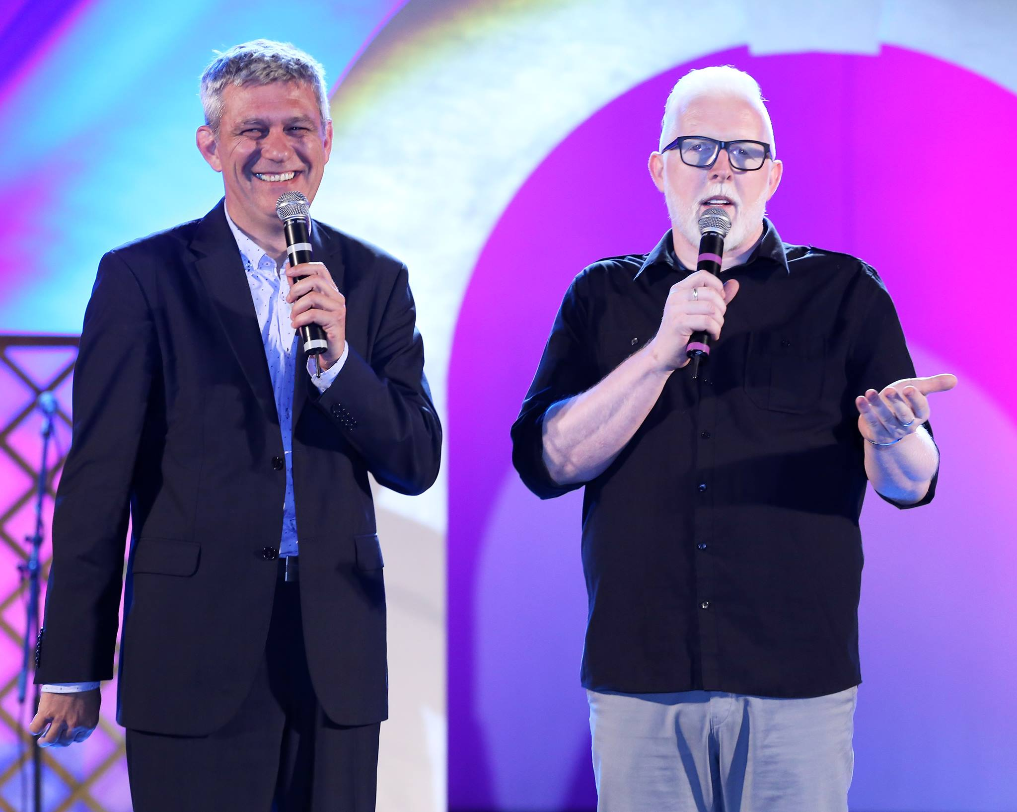 Mario Battifiaca i Robert Ferlin kao voditelji festivala MIK, 2017. godine.